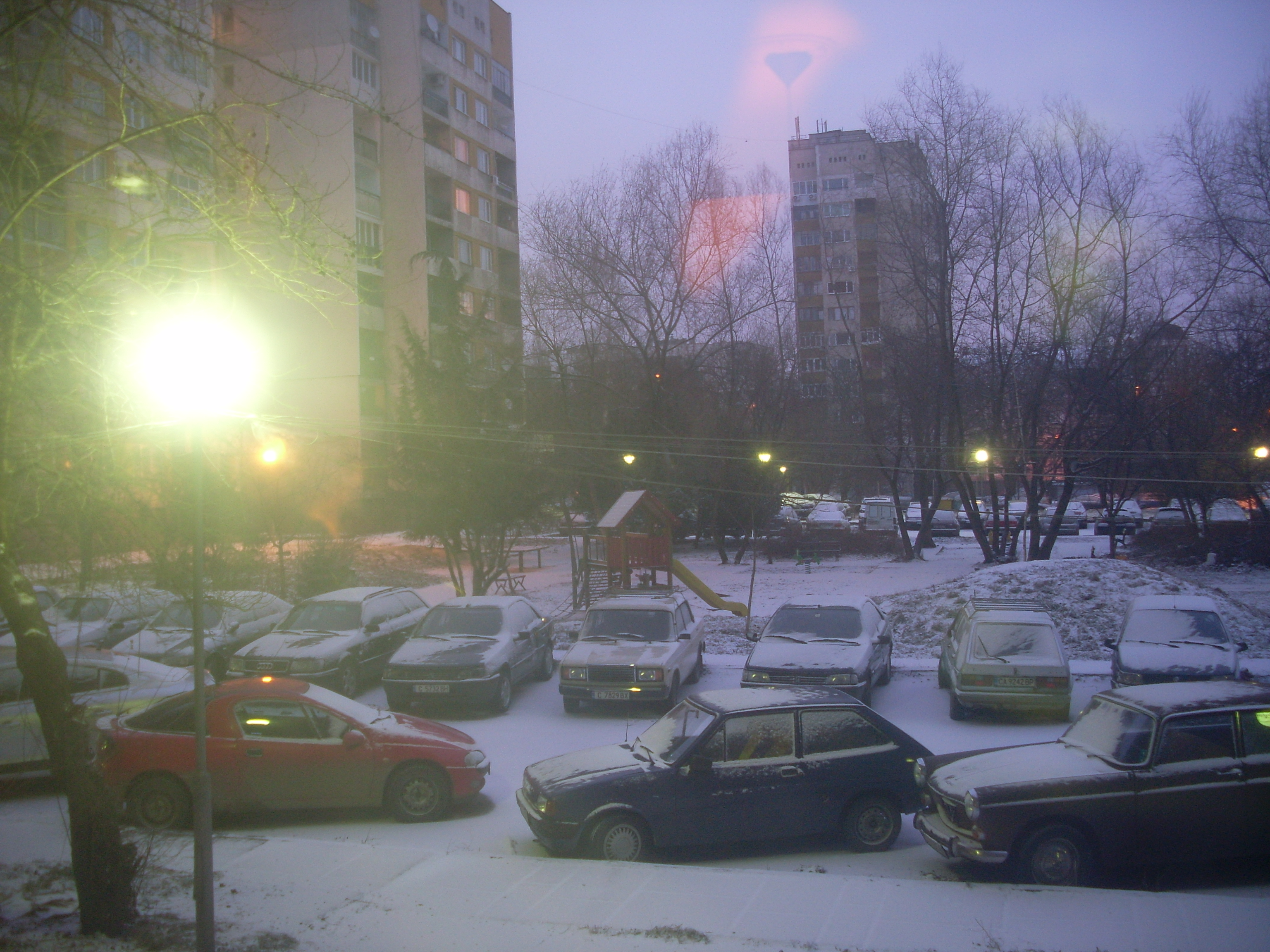 Invierno en Sofia, nieve, luz, Bulgaria, 2011